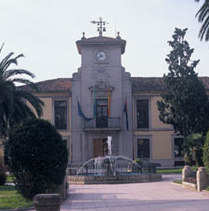 Imagen del Ayuntamiento del concejo de Noreña